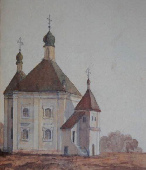 Беларуская (тарашкевіца): Ворша (Vorša), Куцейна (Kuciejna). Манастыр Яўленьня Гасподняга